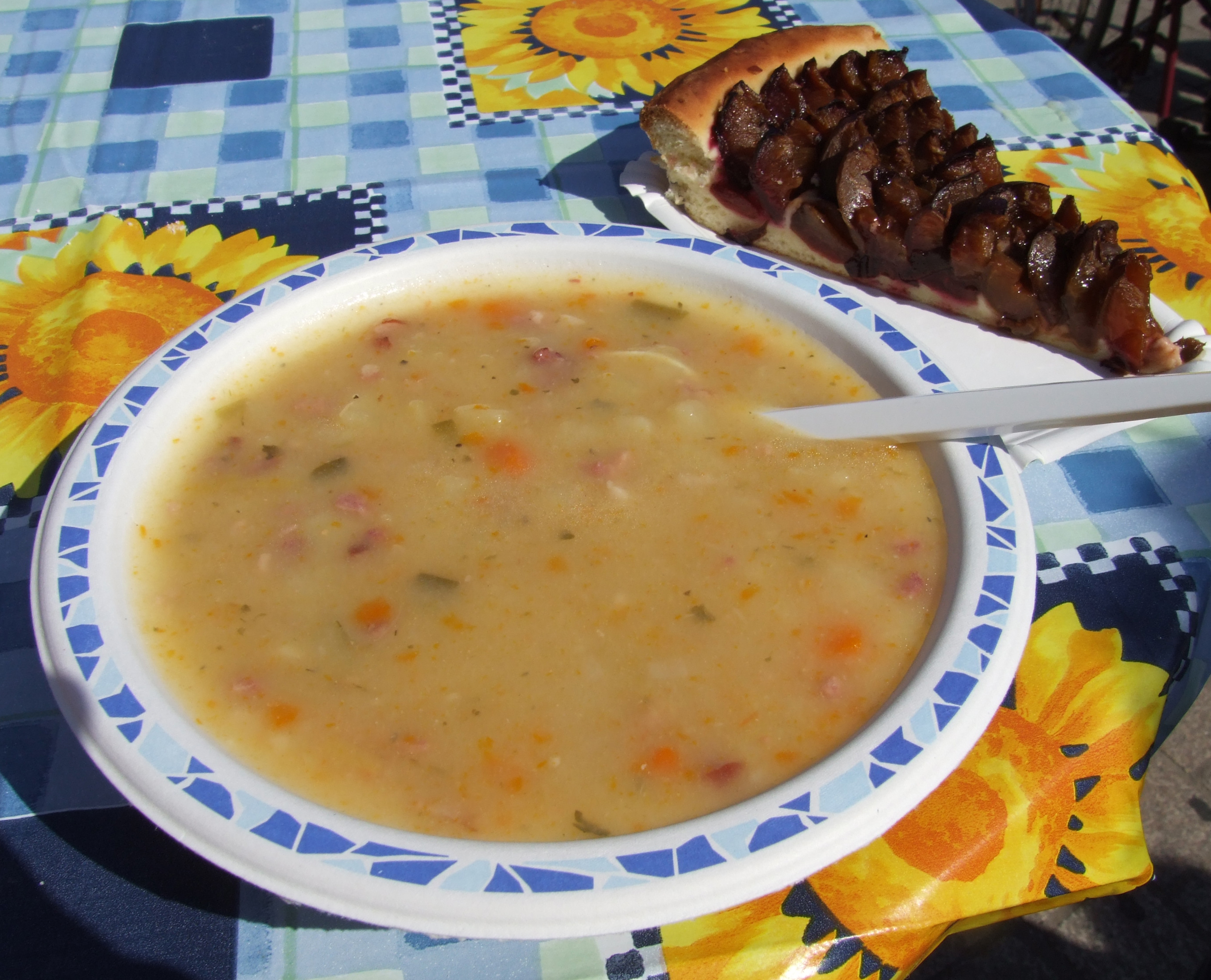 Grumbeersupp_un_Quetschekuche, Kartoffelsuppe und Zwetschgenkuchen, ein Gericht der Pfälzer Küche, hier auf dem Bauernmarkt Speyer